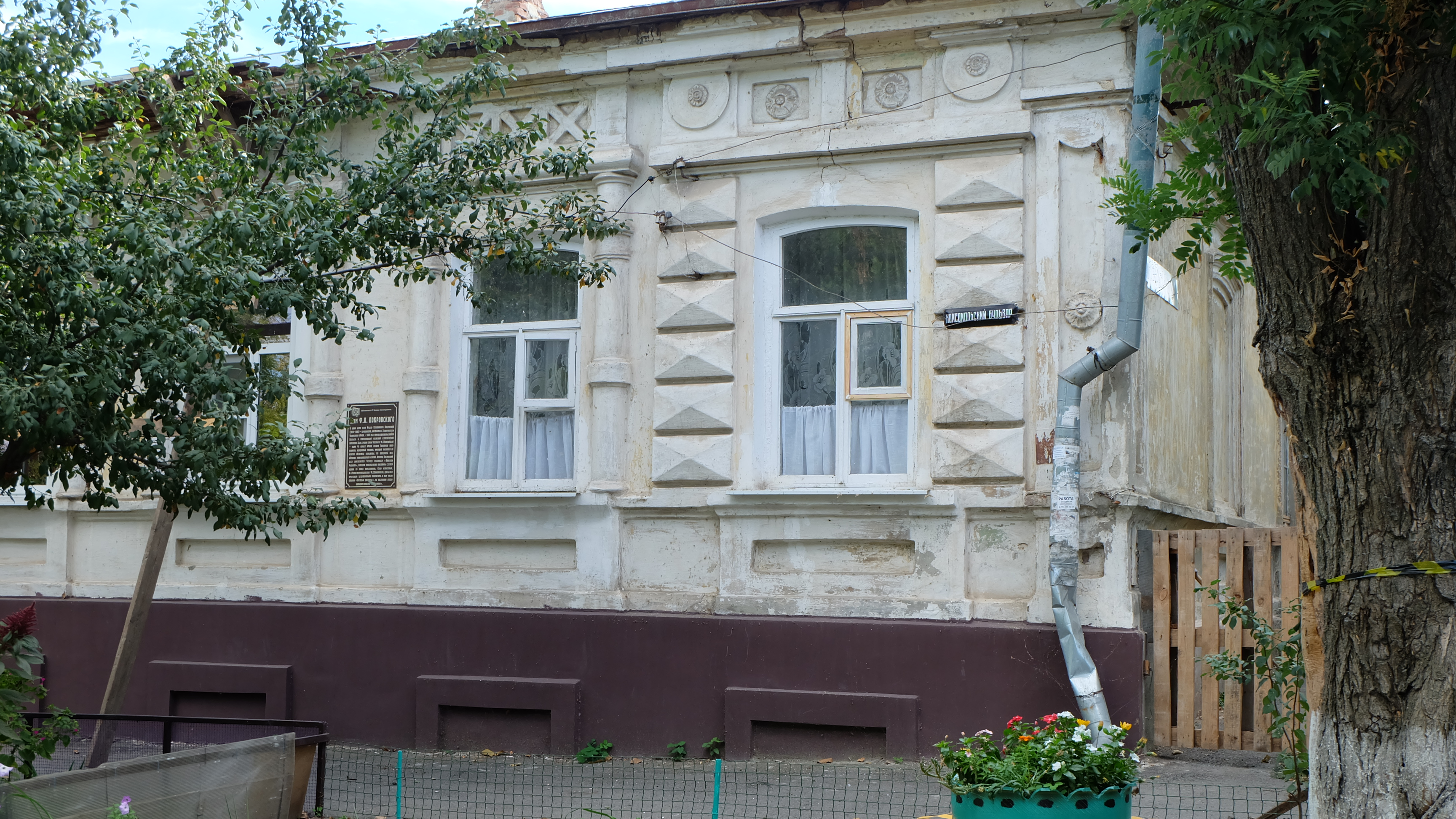 Дом Покровского: бульвар Комсомольский, 43, Таганрог, Ростовская область